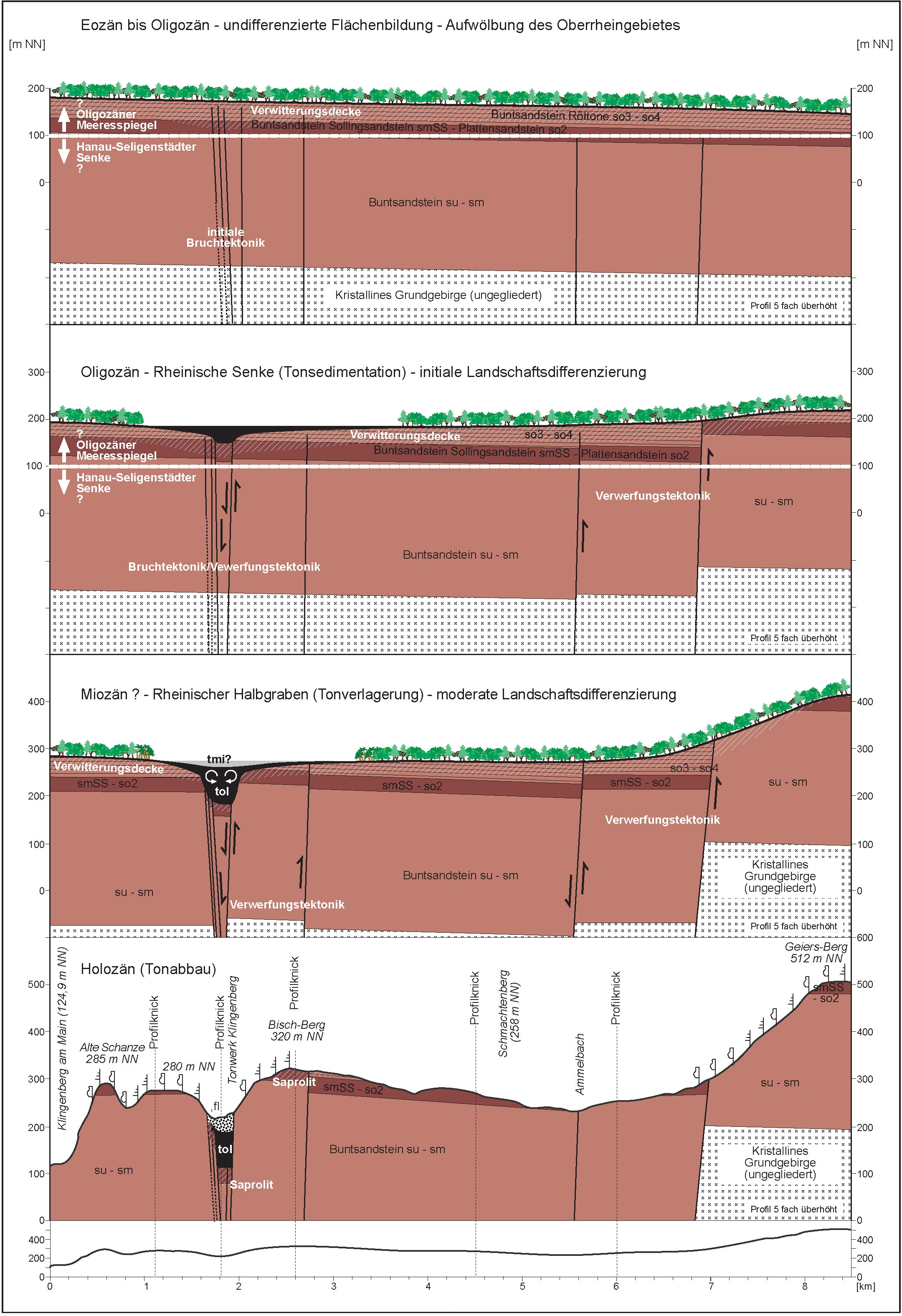 Reliefentwicklung im Großwallstadt-Obernburger Graben im Bereich der Klingenberger Tonlagerstätte vom Eozän bis ins Quartär. Signaturen: ,fl = Quartär (fluviatil), tmi = Miozän, tol = Oligozän.